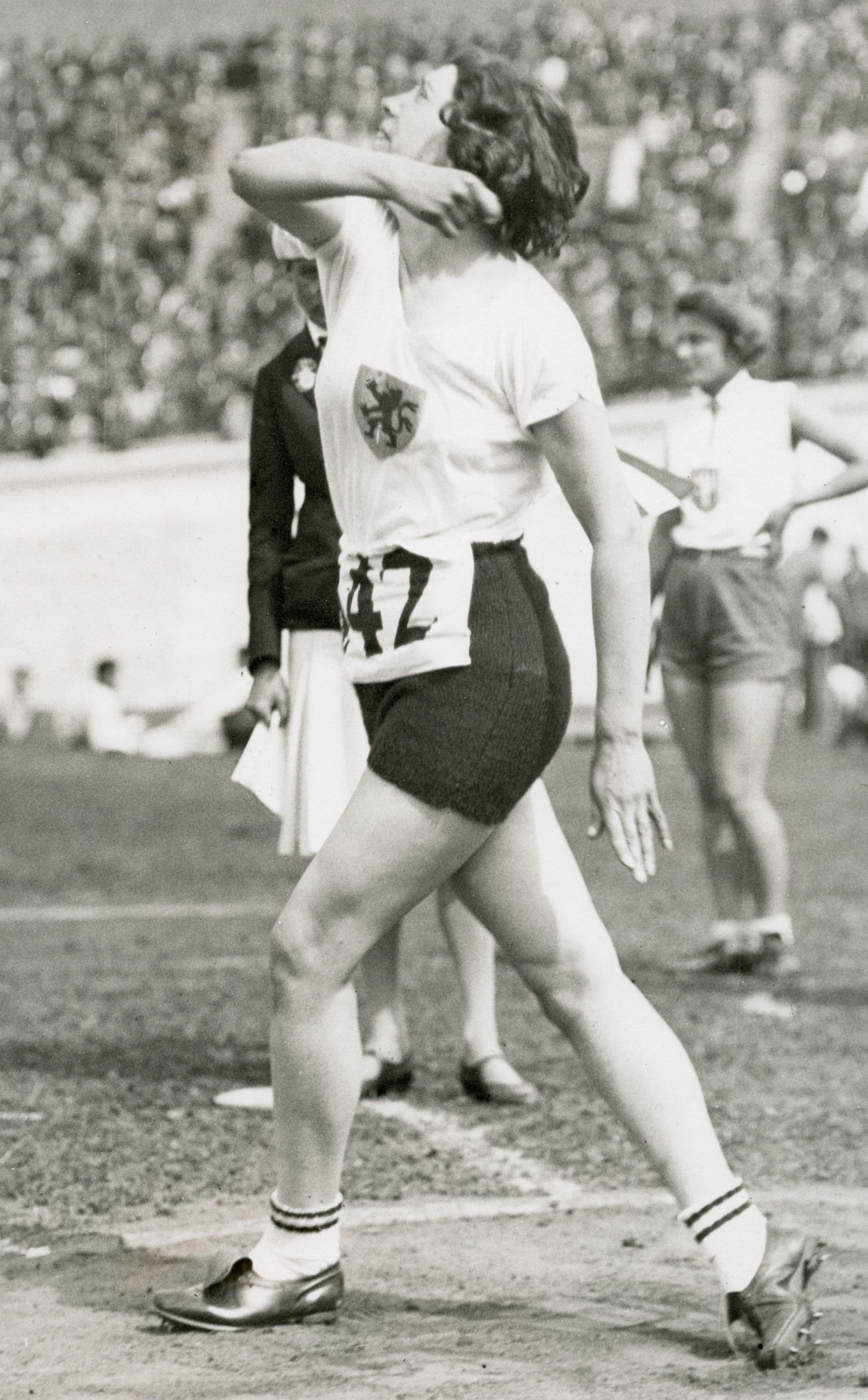 Sport. Olympische Spelen 1928 Amsterdam, Nederland. Atletiek, discuswerpen dames. Op de foto de Nederlandse 'zus' Berendina Johanna Dekens. Ze wierp 29,36 m.